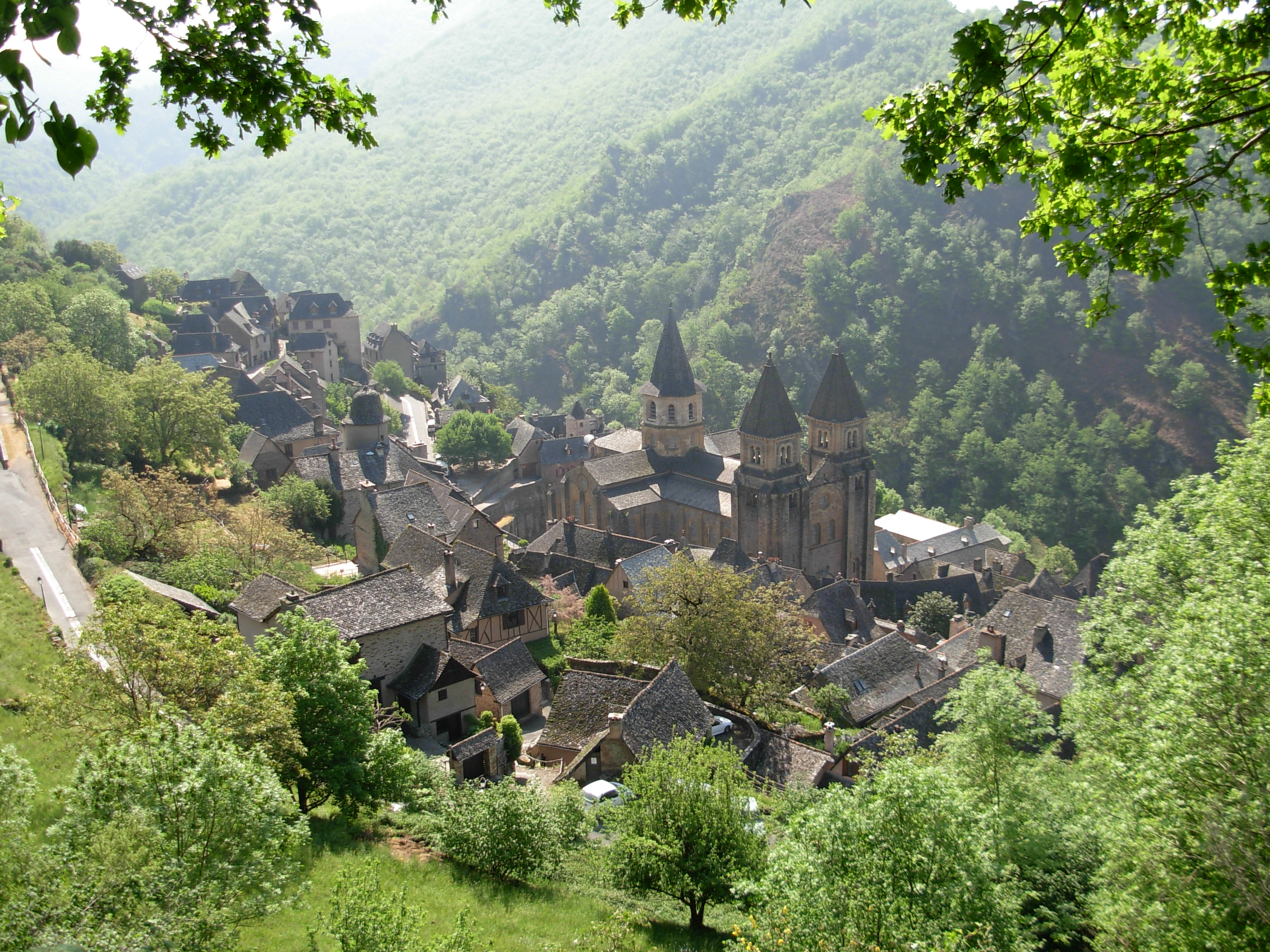 Vue générale de l'ensemble abbatial